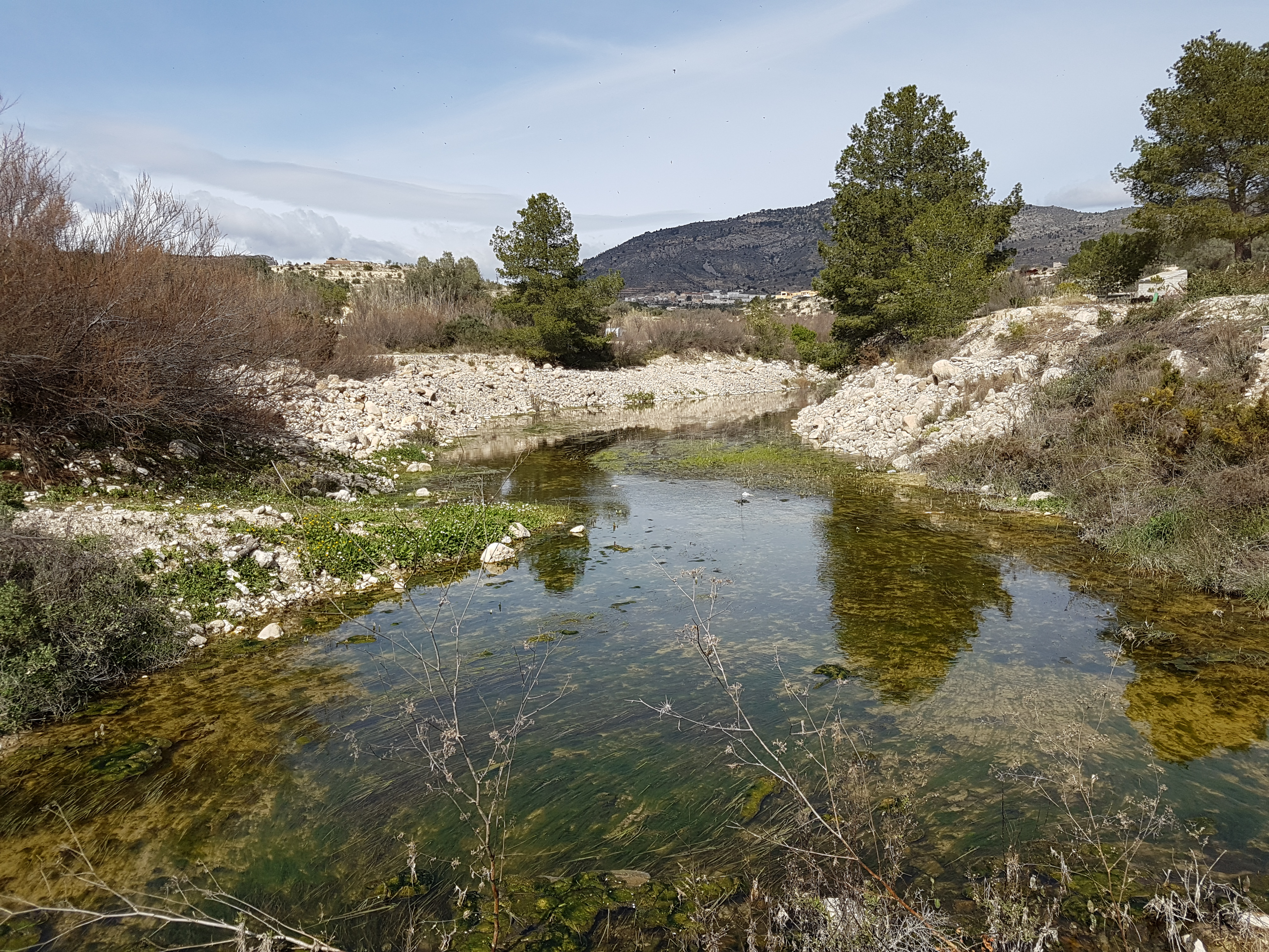 Rio Amadorio cerca de Relleu